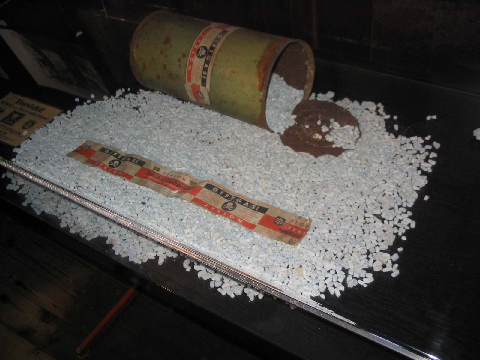 Zyklon B